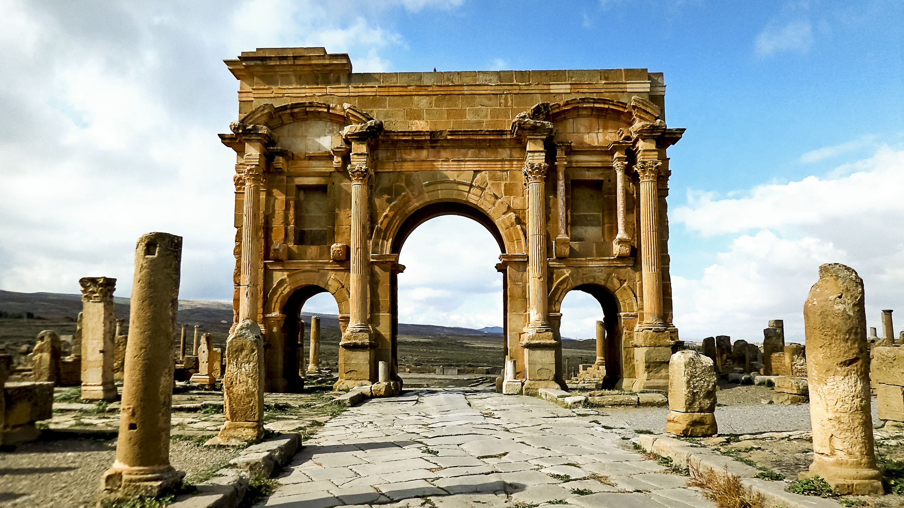 Timgad, wilaya de Batna تيمقاد، ولاية باتنة